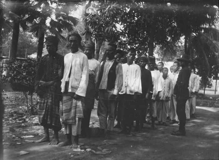 Foto. Veroordeelden worden in Soerabaja naar de gevangenis gebracht